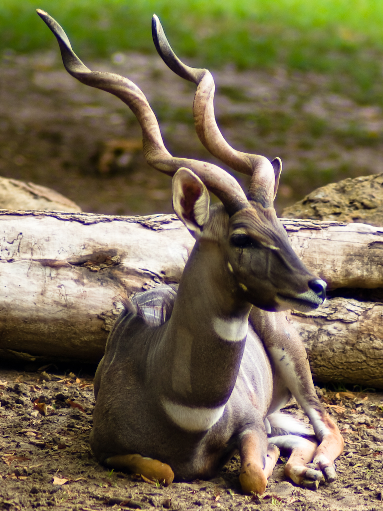 Male Lesser Kudu (Tragelaphus imberbis) in Fort Worth Zoo